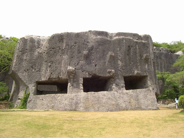 南京明文化村 陽山碑材 碑額 2004年5月4日撮影 撮影者:権作 参照：